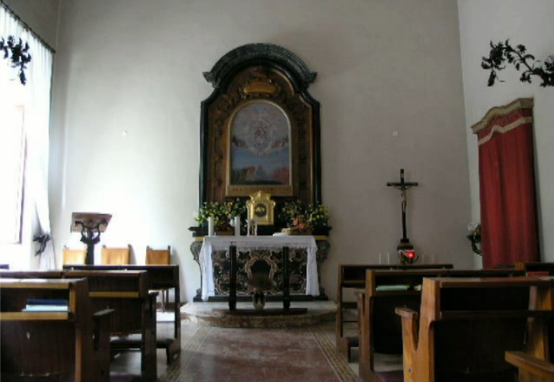 Cappella privata della famiglia Brentano a Palazzo Brentano - Corbetta (MI) - Italy